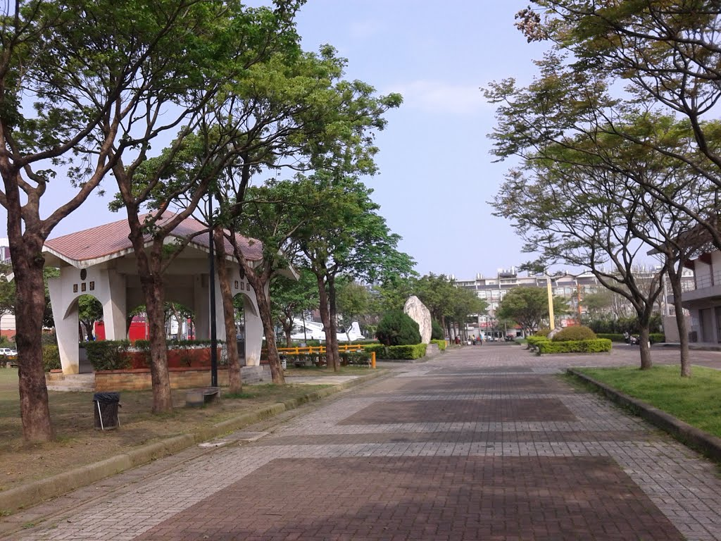 龍潭區運動公園